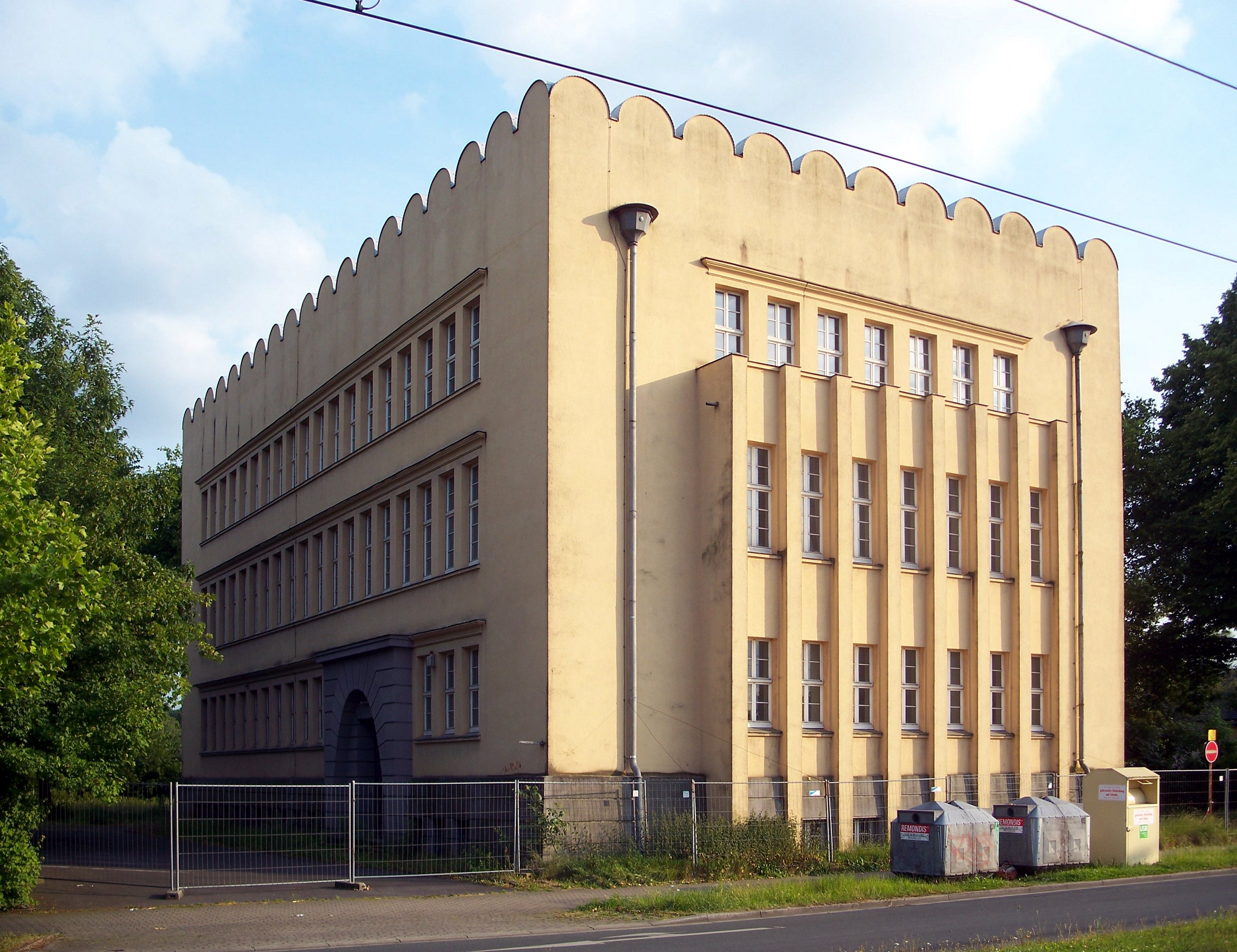 Das Verwaltungsgebäude des Höntroper Werks des Bochumer Vereins. Das Flachdach des Gebäudes wurde häufig als Besucherterrasse genutzt - die halbrunden Attikaabschlüsse findet man auf zahlreichen zeitgenössischen Fotos z.B. bei Besuchen von NS-Größen mit der großen Halle des SM-Werkes als Bildhintergrund. Im Areal hinter dem Verwaltungsgebäude an der Essener Straße befindet sich die Wohnsiedlung "Kolonie Höntrop", rechts neben dem Gebäude steht das Torhaus 11. Das vom Düsseldorfer Architekt Wilhelm Kreis entworfene Gebäude steht seit 1990 unter Denkmalschutz.